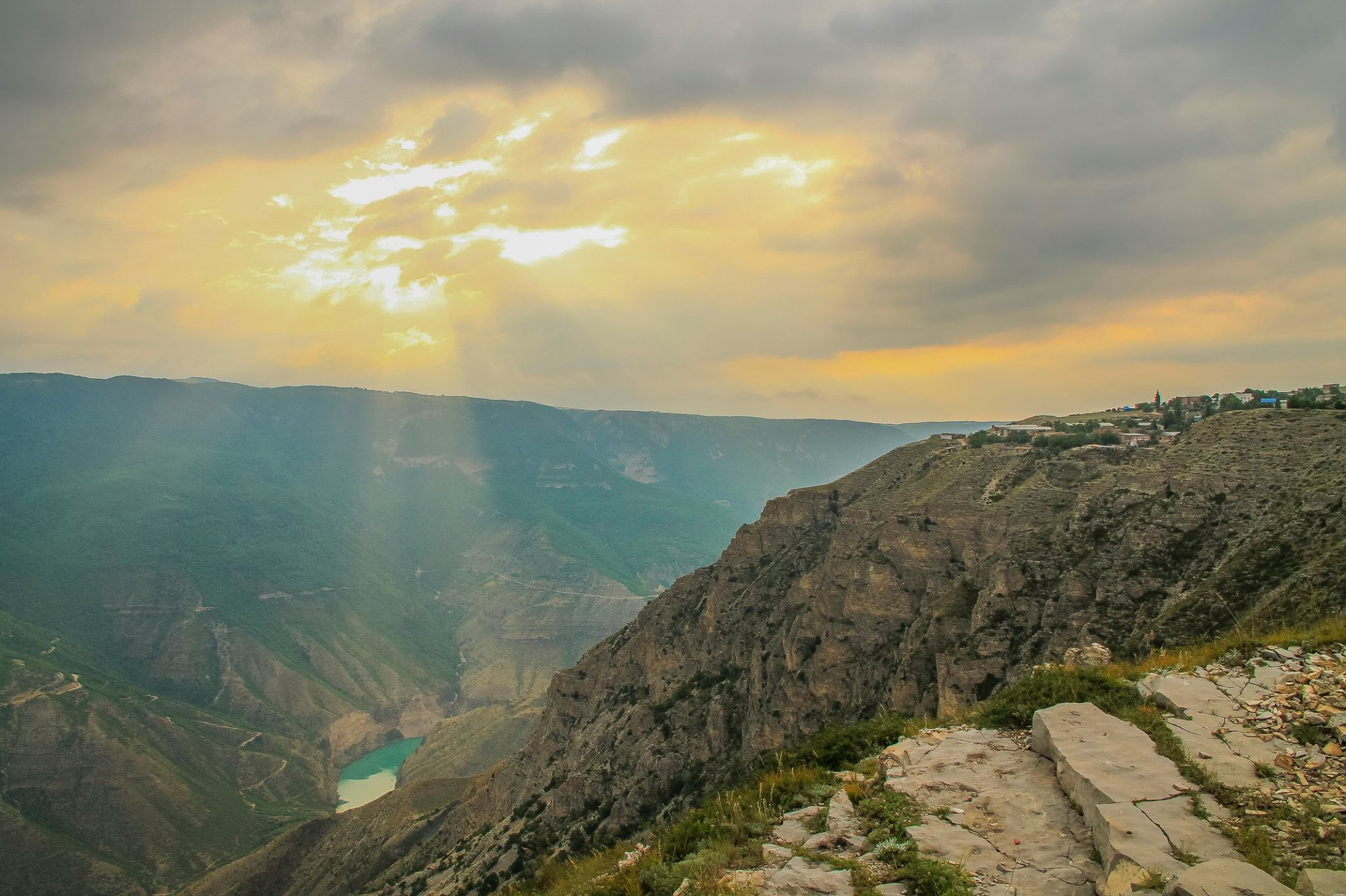 Сулакский каньон в дагестане